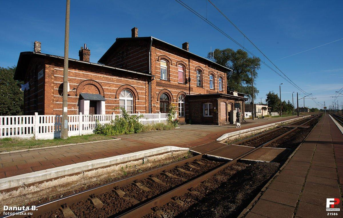 Budynek dworca na przystanku Kowalów, położonego przy czynnej linii Wrocław - Szczecin.